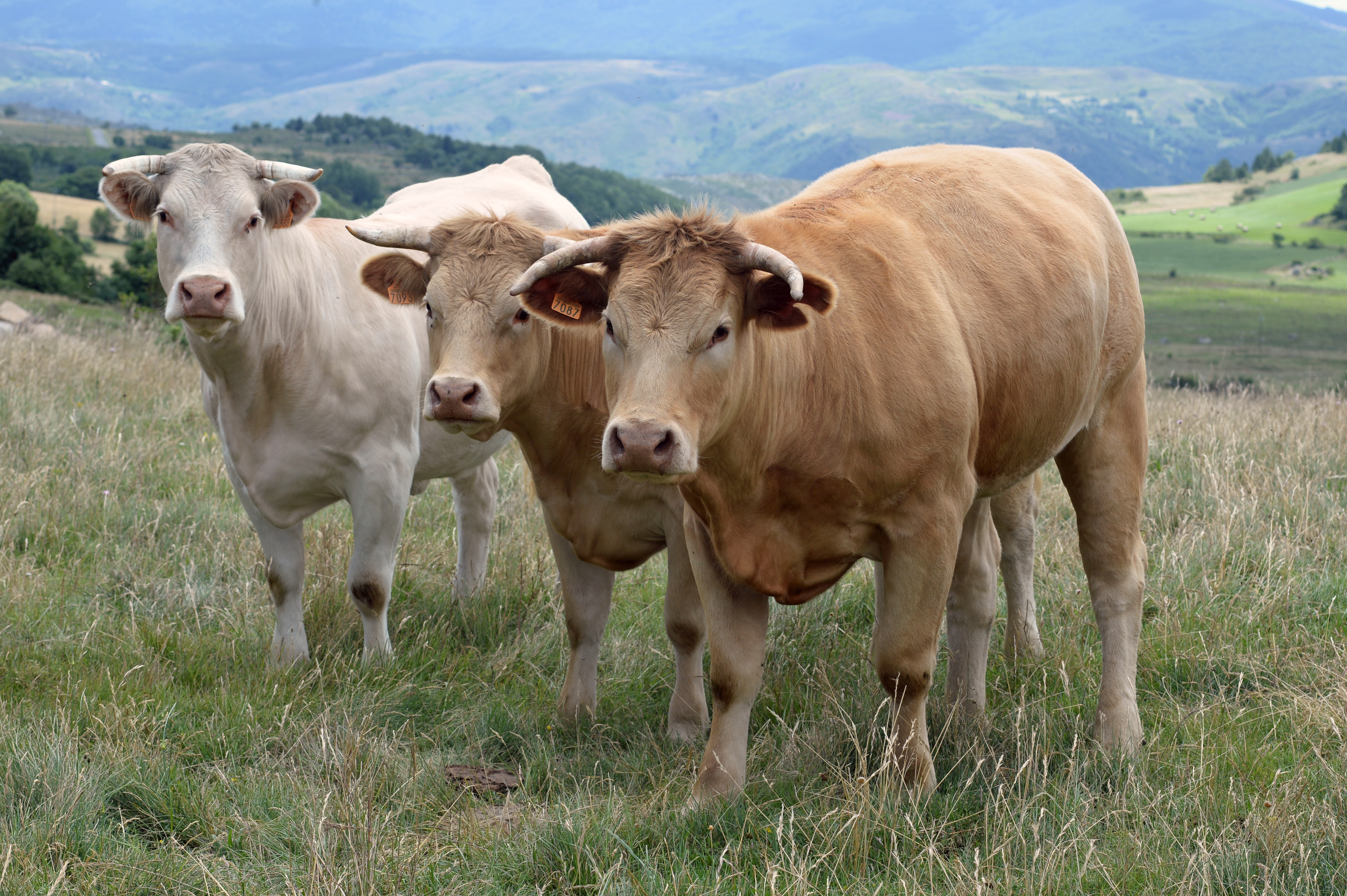 Bœufs fermiers du Maine